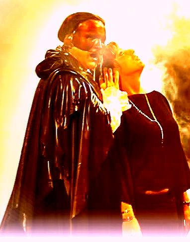 Pedro pomares dando vida al fantasma de la opera